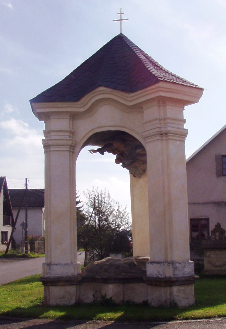 Kaple Nejsvětější Trojice (Žireč), při silnici do Stanovic, Žireč